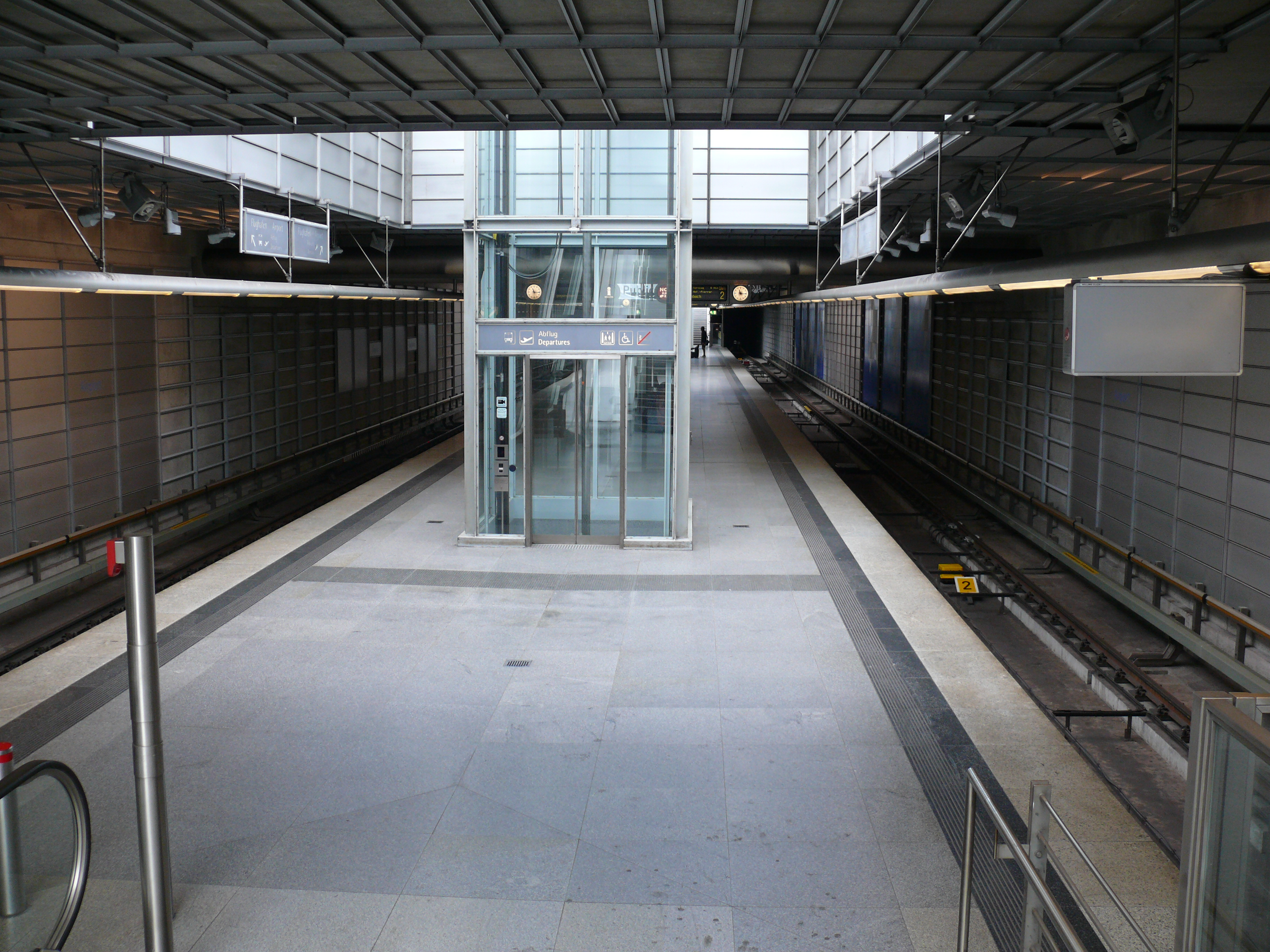 Bahnsteigebene mit Tageslichteinfall am U-Bahnhof Flughafen in Nürnberg.